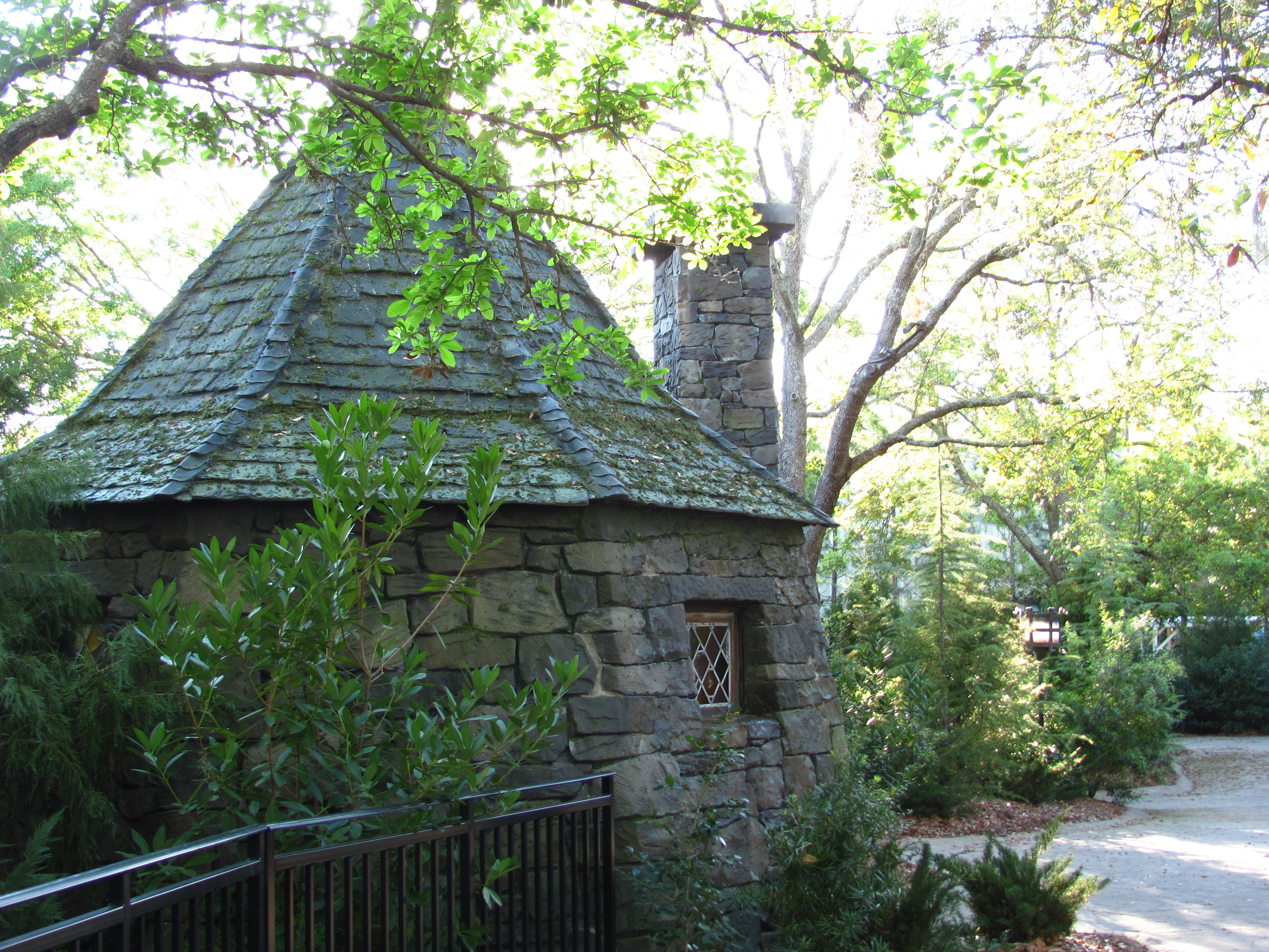 Hagrid's Hut